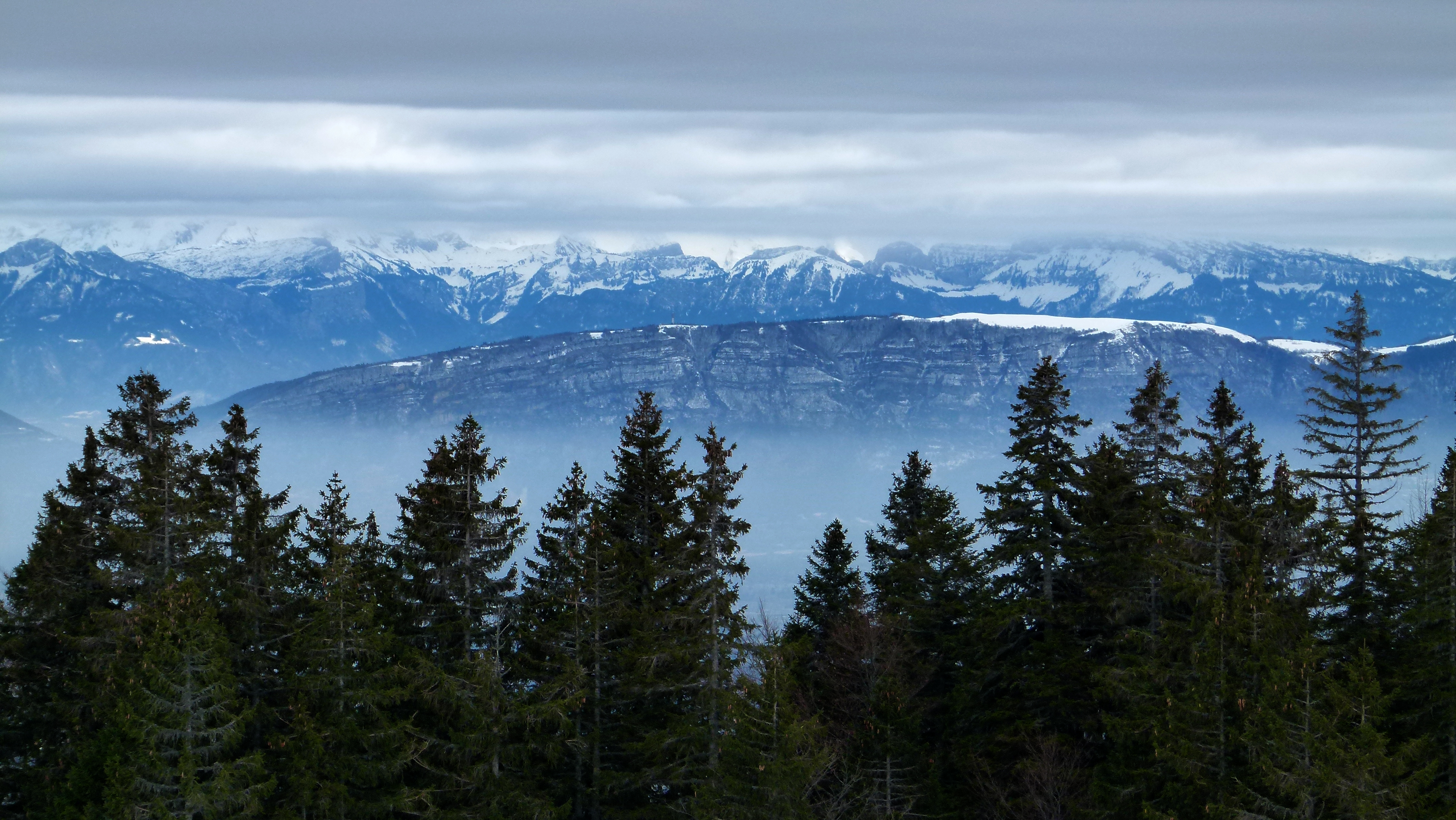 Blick auf den Salève vom Col de Crozet (Jura) aus